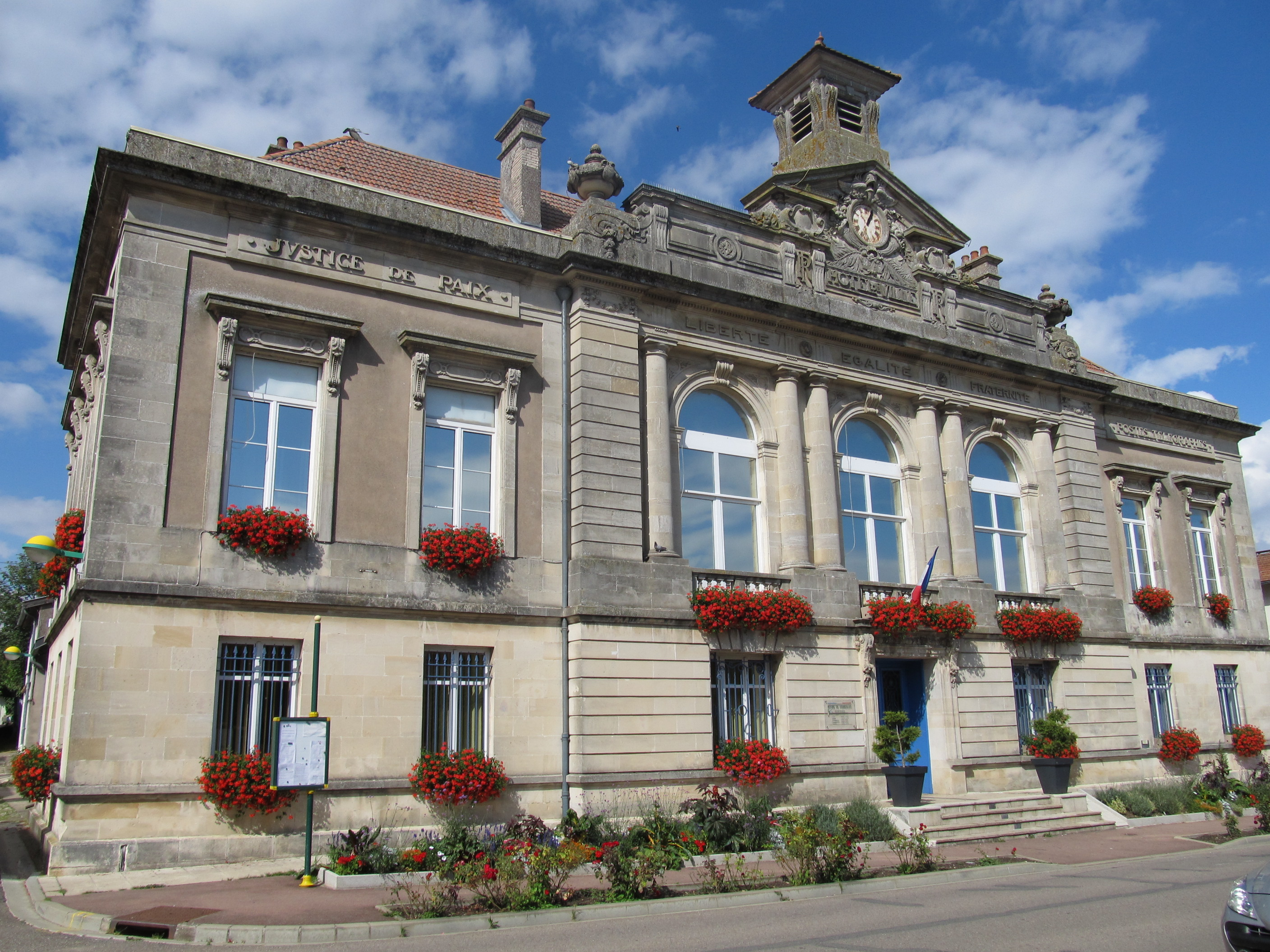 Vigneulles-lès-Hattonchâtel: la mairie